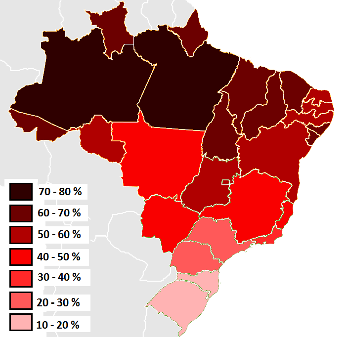 Estados Brasileiros por percentagem de pardos em 2009. Fontes